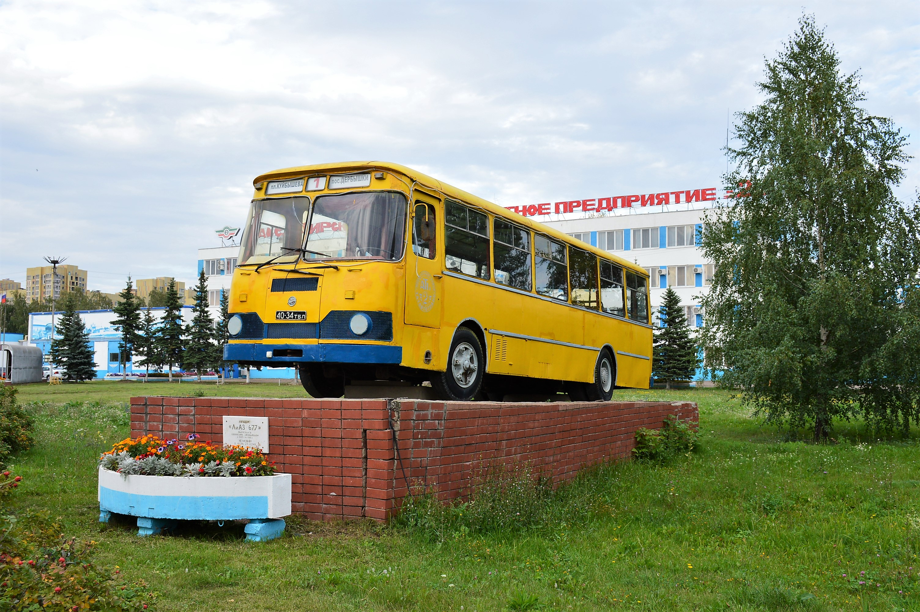 Казань. Памятник автобусу ЛиАЗ-677 перед офисом «Пассажирского автотранспортного предприятия № 2» (ПАТП-2) (ул. Крылова, 3)